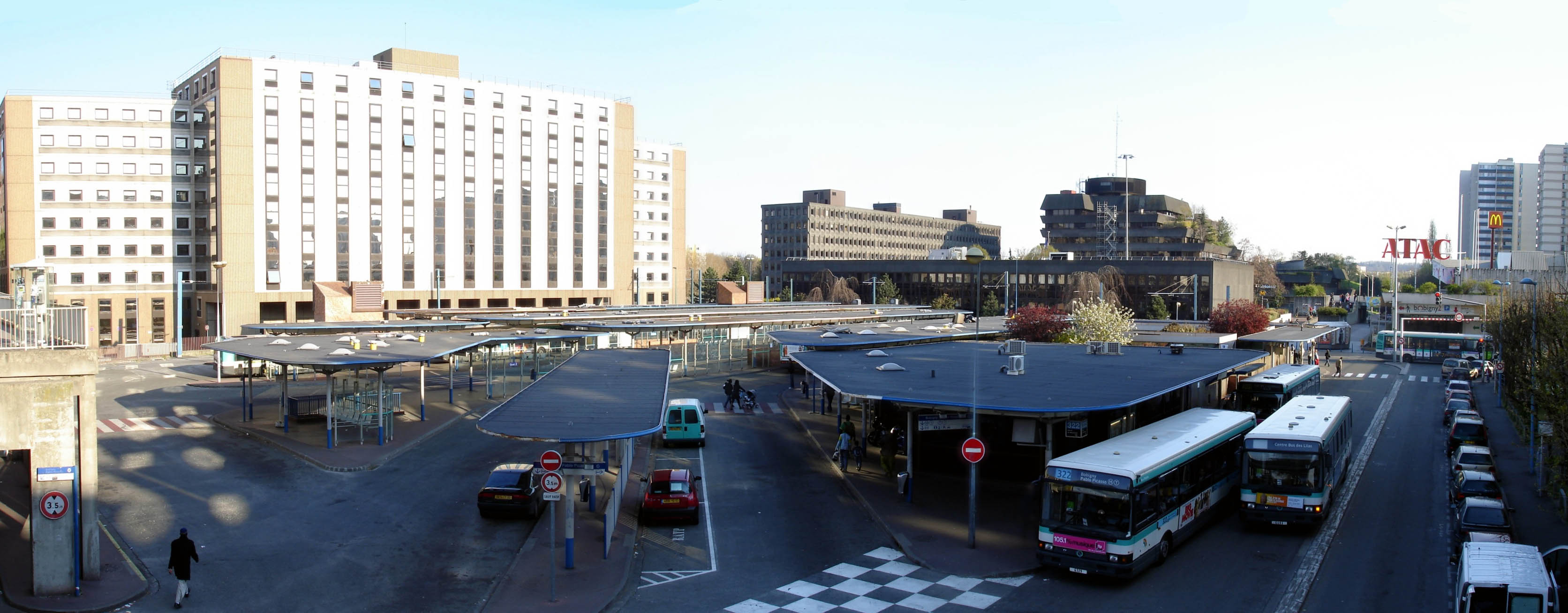 Gare routière de la station Pablo-Picasso à Bobigny (Seine-Saint-Denis), France